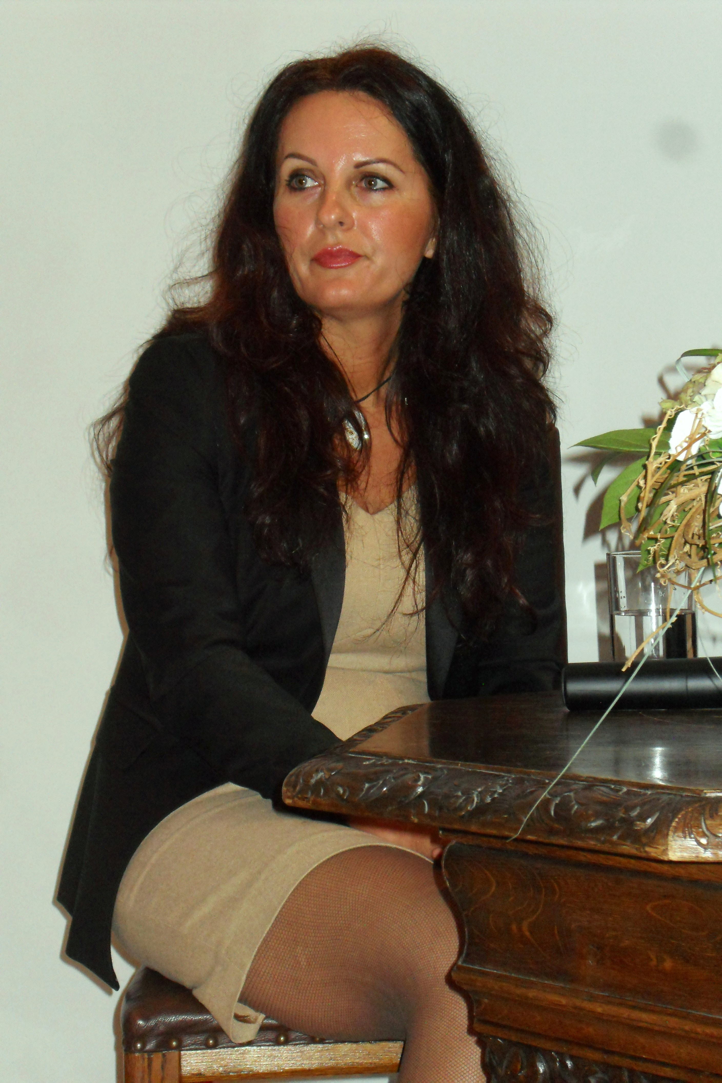 Poetka, pisarka i tłumaczka Magdalena Parys.